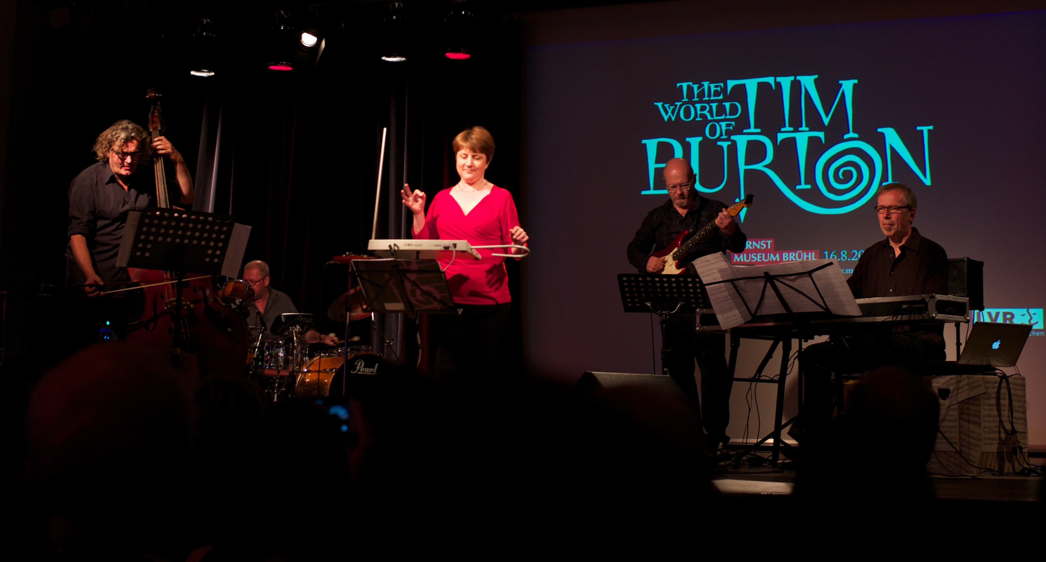 Lydia Kavina playing Tim Burton movie melodies at opening night of Tim Burton exhibit, 15. August 2015, May-Ernst-Museum, Brühl (Germany)